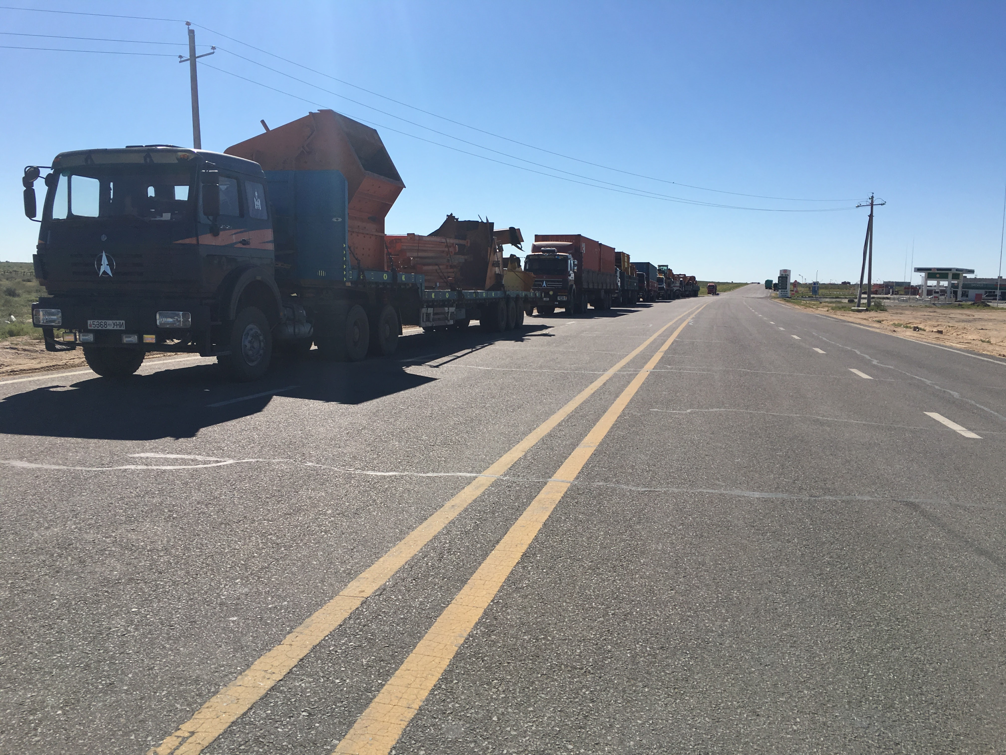 Монгол: Кени, Ангол, Пакистан зэрэг улс руу экспортонд гарах гэж буй тоног төхөөрөмжүүд